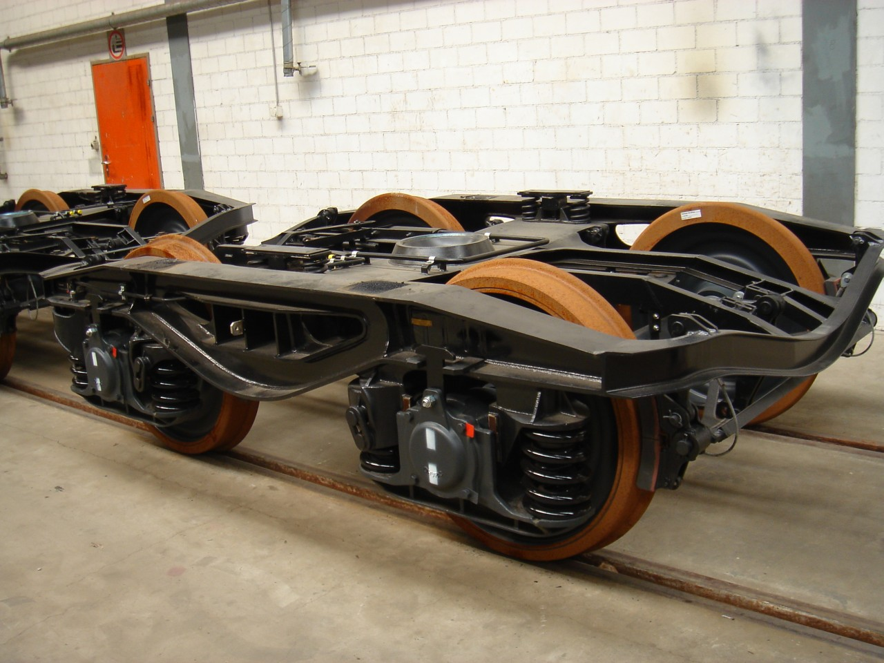 Y25-Drehgestell angeliefert nach Rheinfelden zum Einbau in neue Wagen der Josef Meyer AG Rheinfelden